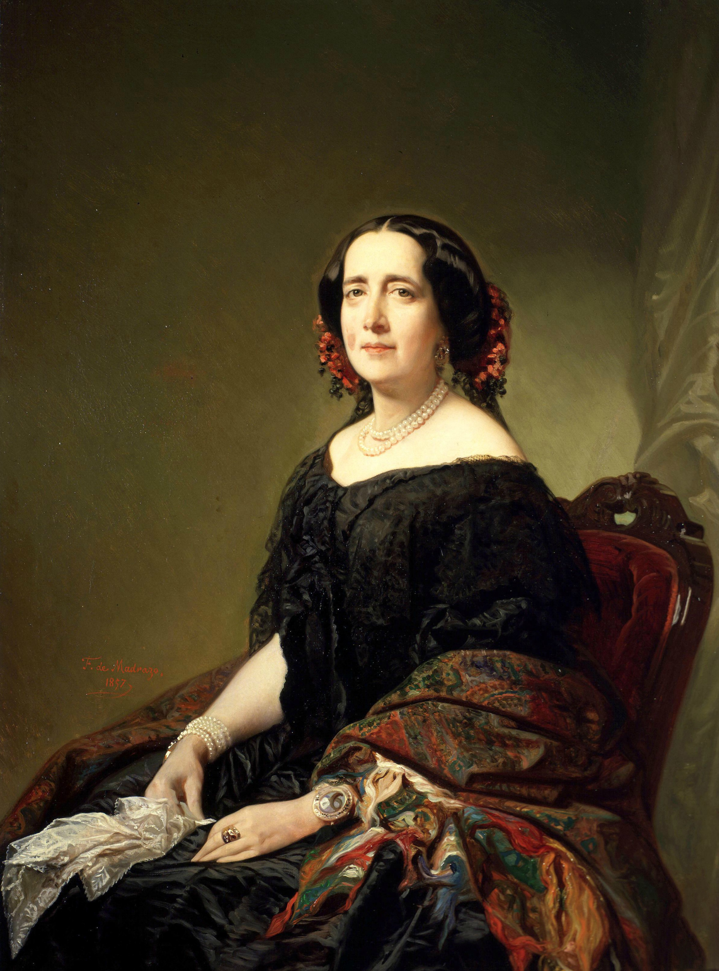 Retrato de la escritora romántica de origen cubano Gertrudis Gómez de Avellaneda (1814-1873).